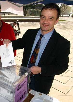 Votació d'en Alfred Bosch, portaveu de Barcelona Decideix i escriptor